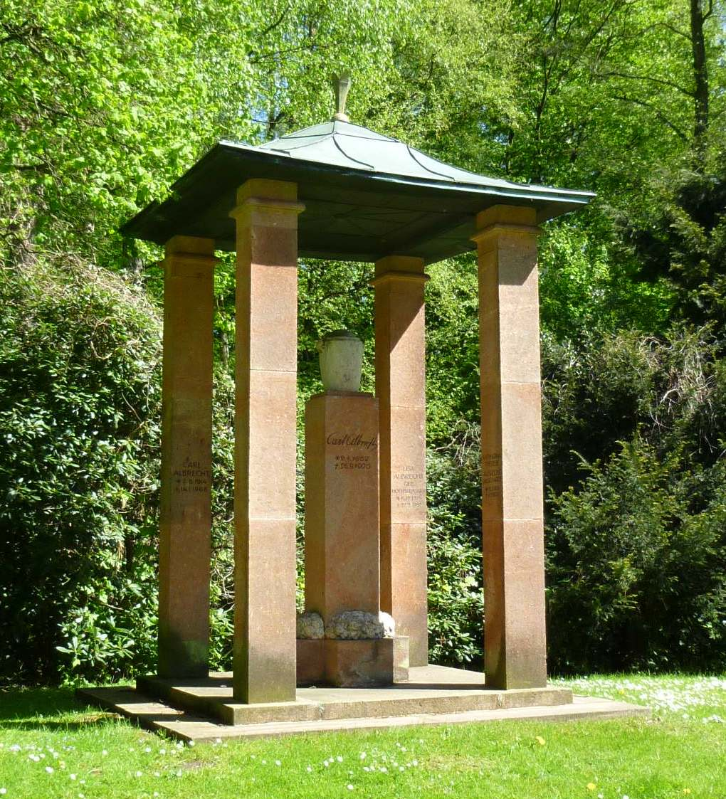 Grabdenkmal